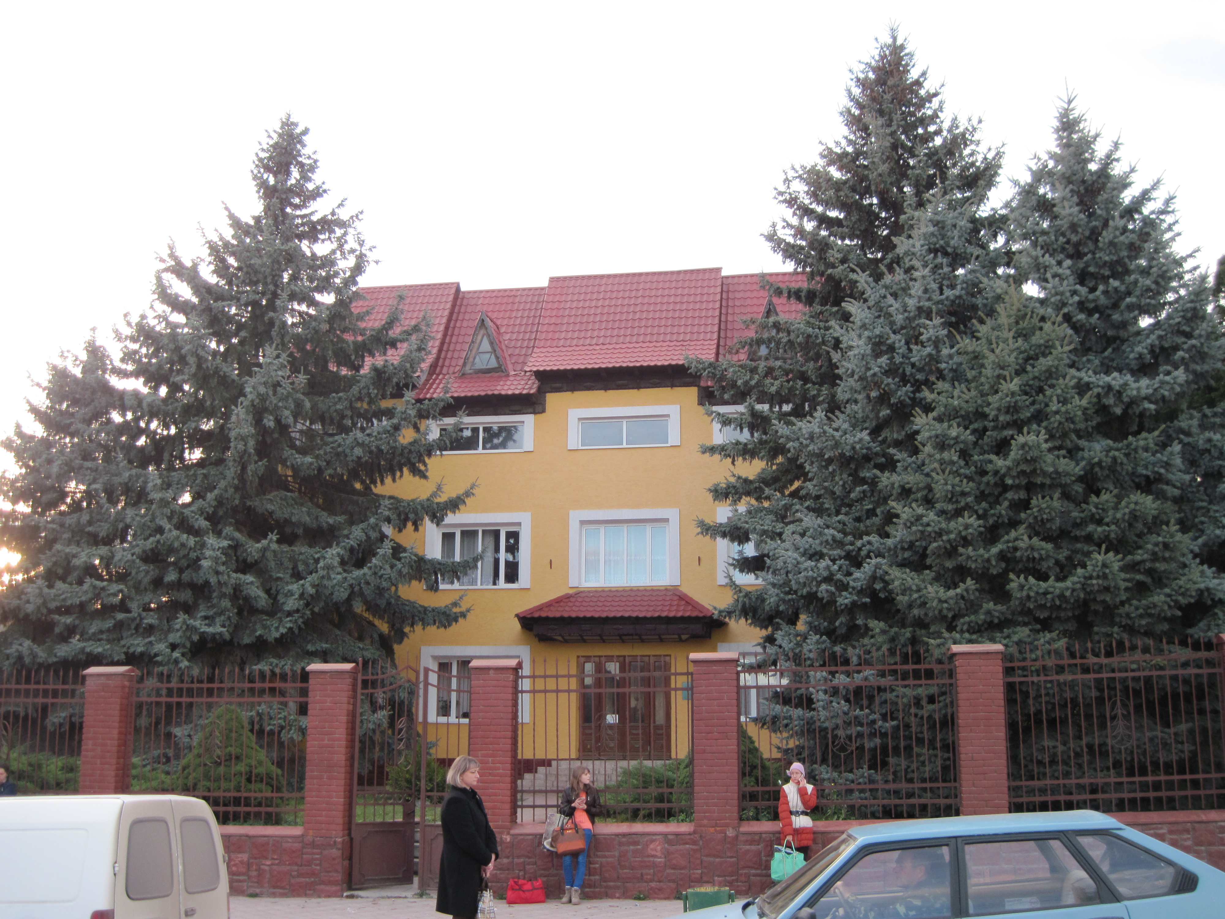 ДП Чортківське лісове господарство